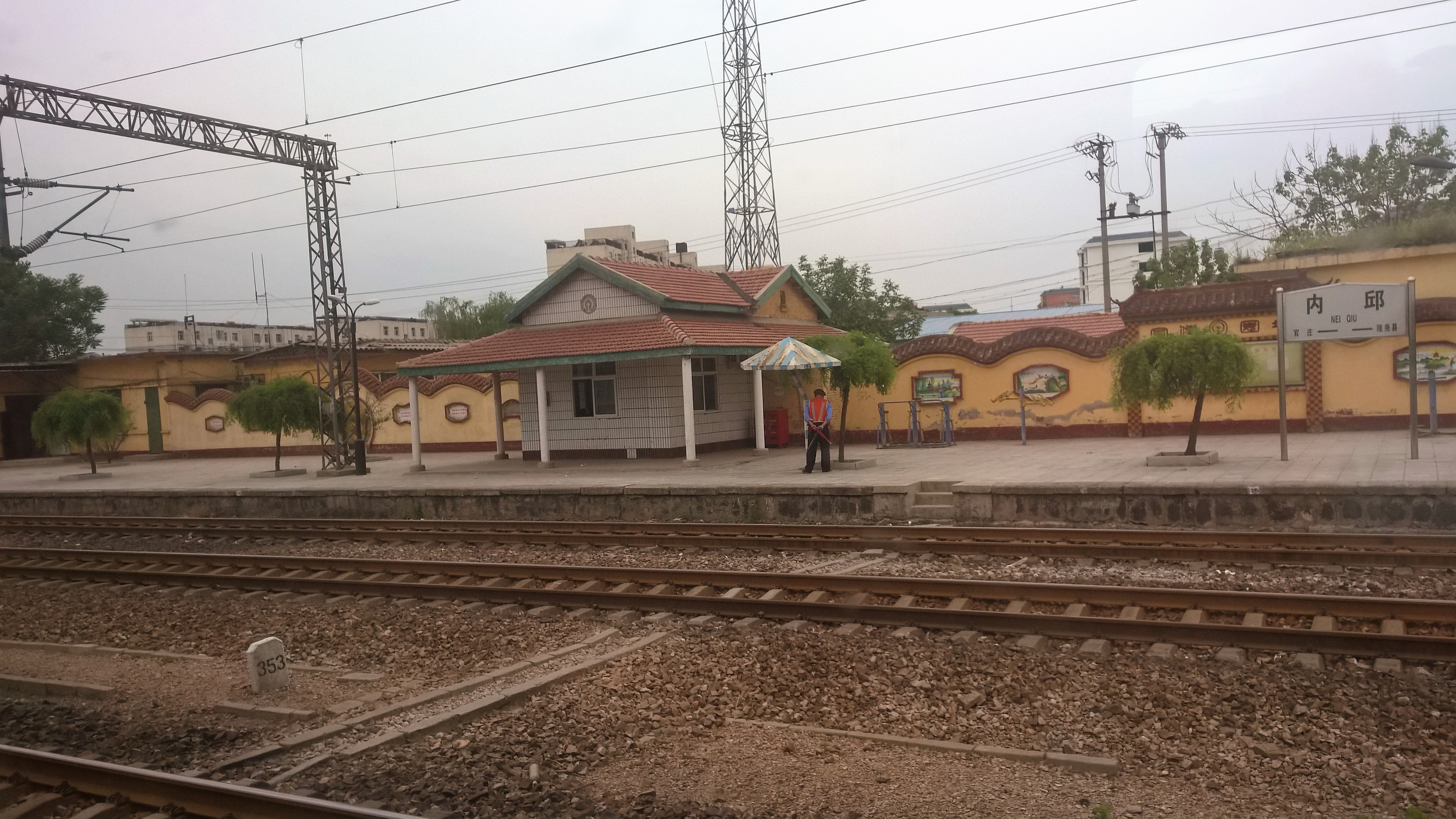 内邱站内邱站